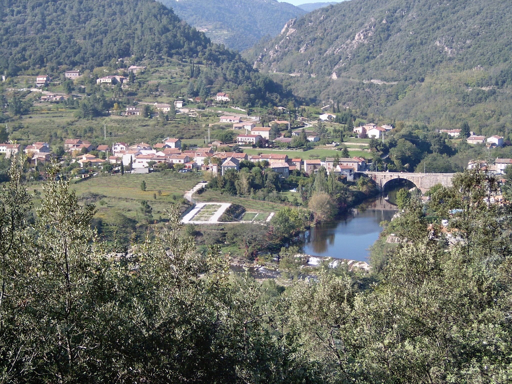 Dunière-sur-Eyrieux, village Ardéchois dans la vallée de l'Eyrieux